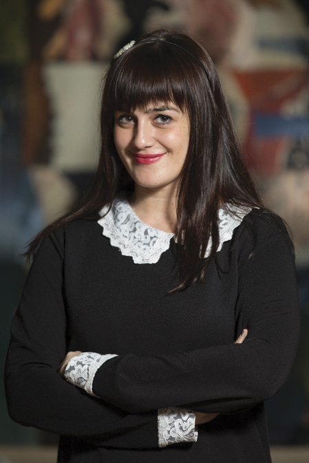 Српски (ћирилица): др Милана Писарић